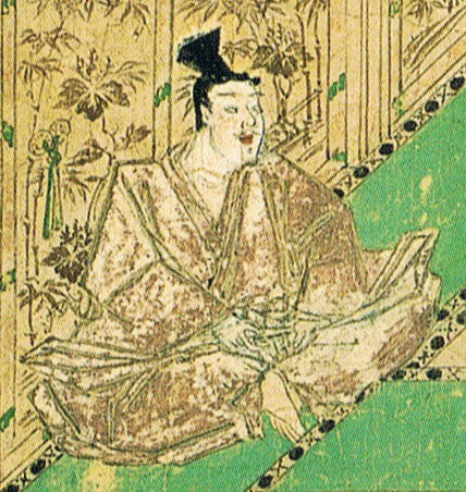 『蒙古襲来絵詞』絵九 自邸で竹崎季長の「先駆けの功」の訴えを聞く安達泰盛。